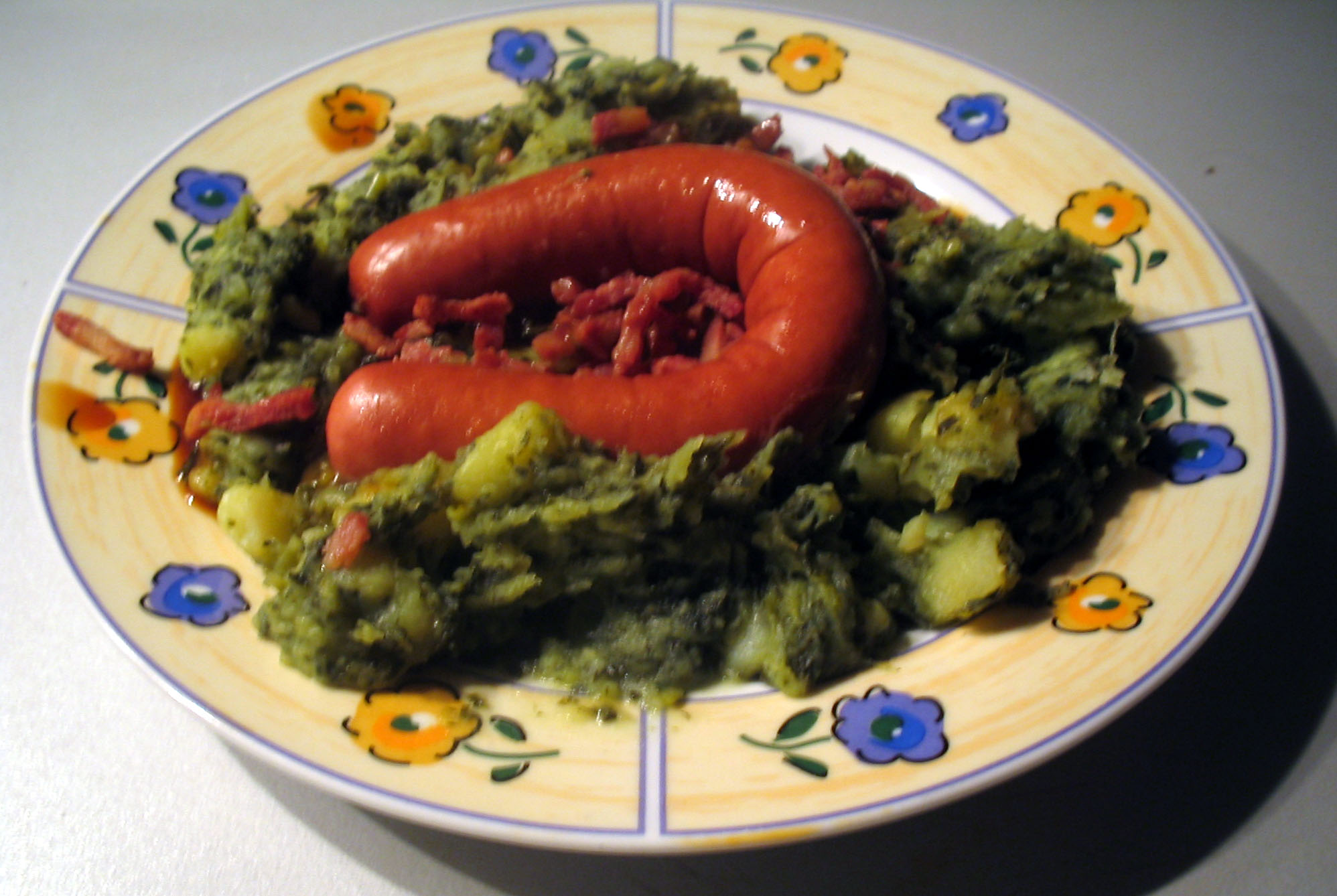 Boerenkool met worst